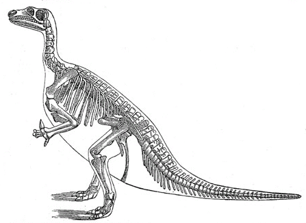 [orig. Bildunterschrift:] Iguanodon Bernissartensis Blg.